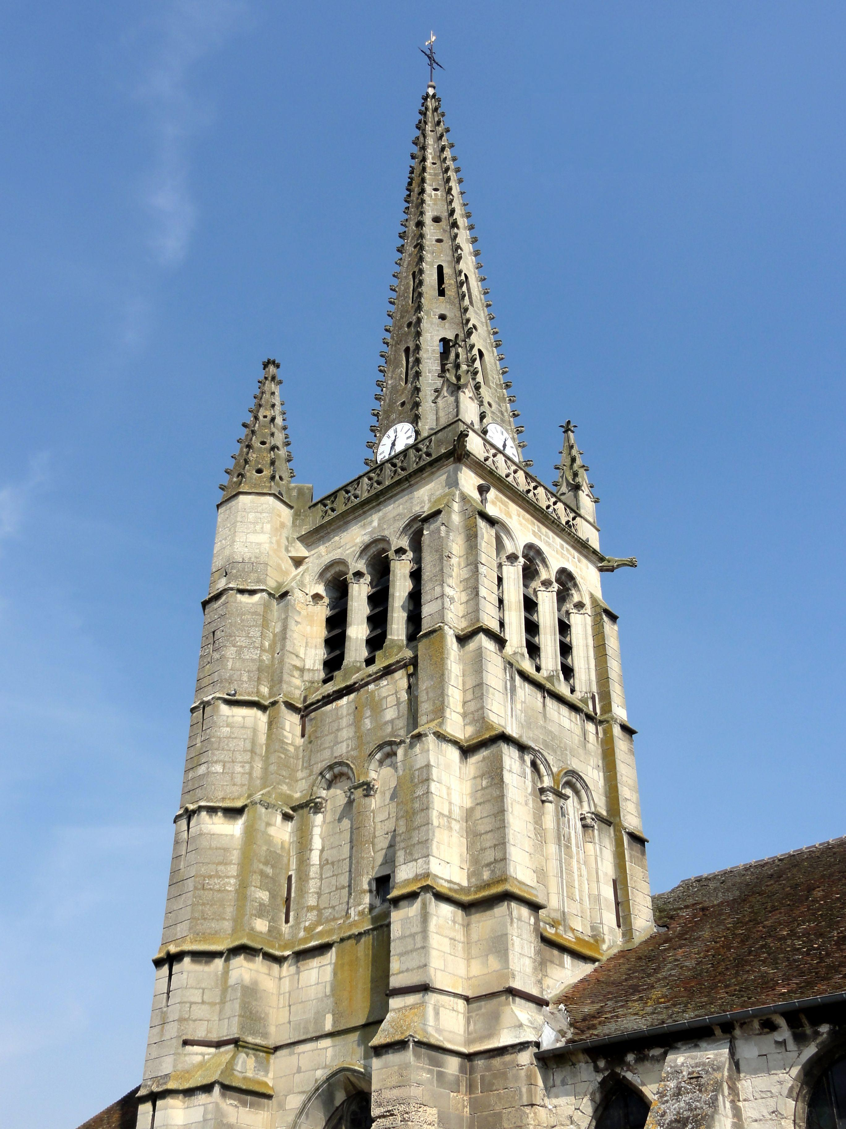 Clocher, vue depuis le sud.